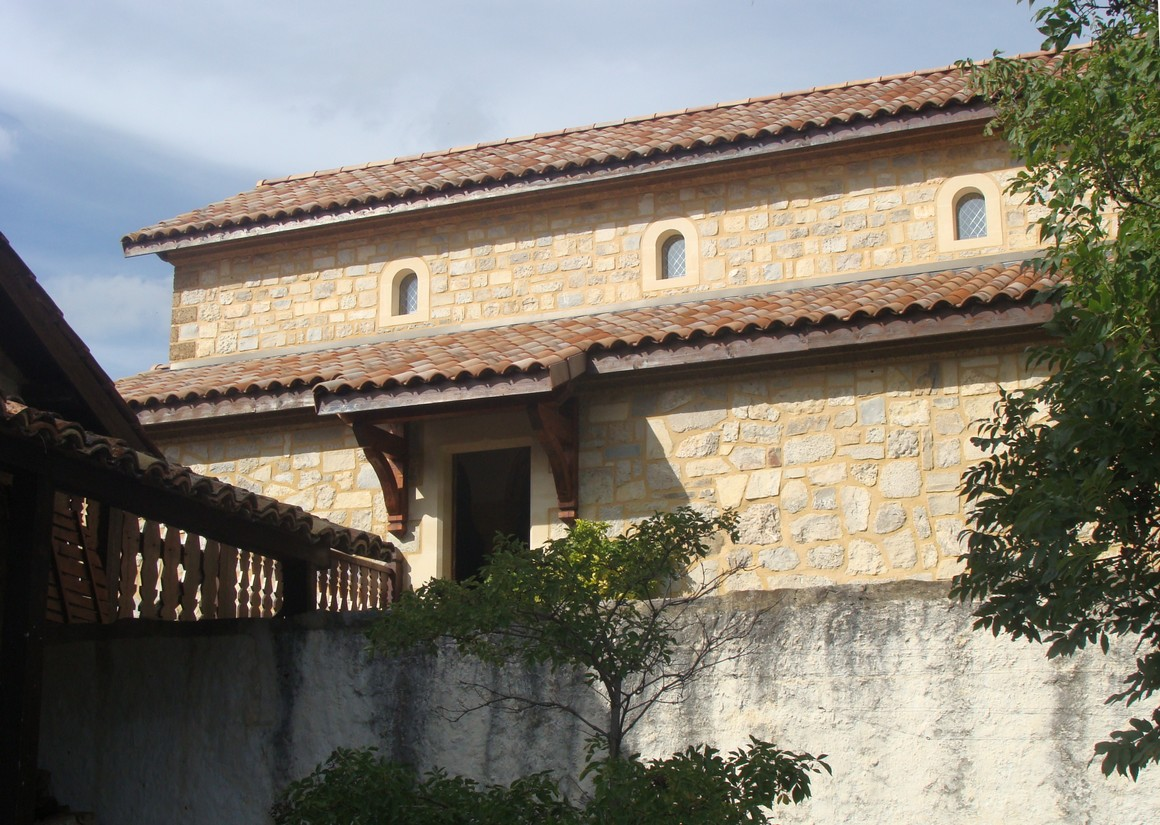 Un bâtiment de construction récente abritant les activités des moines de la Faurie.